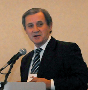 Alejandro Abal, Ex decano de la Facultad de Derecho